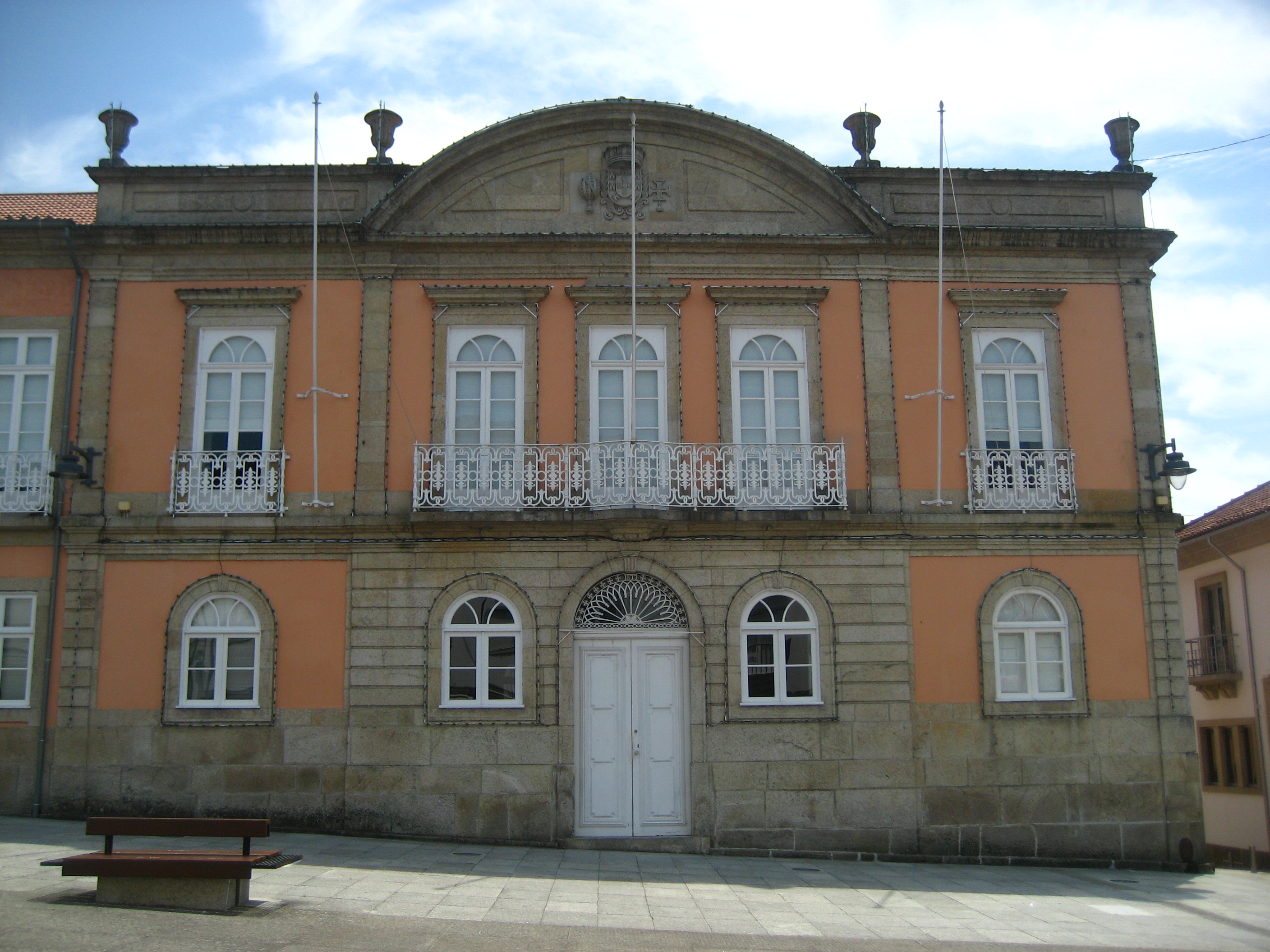 Mairie d'Arcos de Valdevez, Portugal